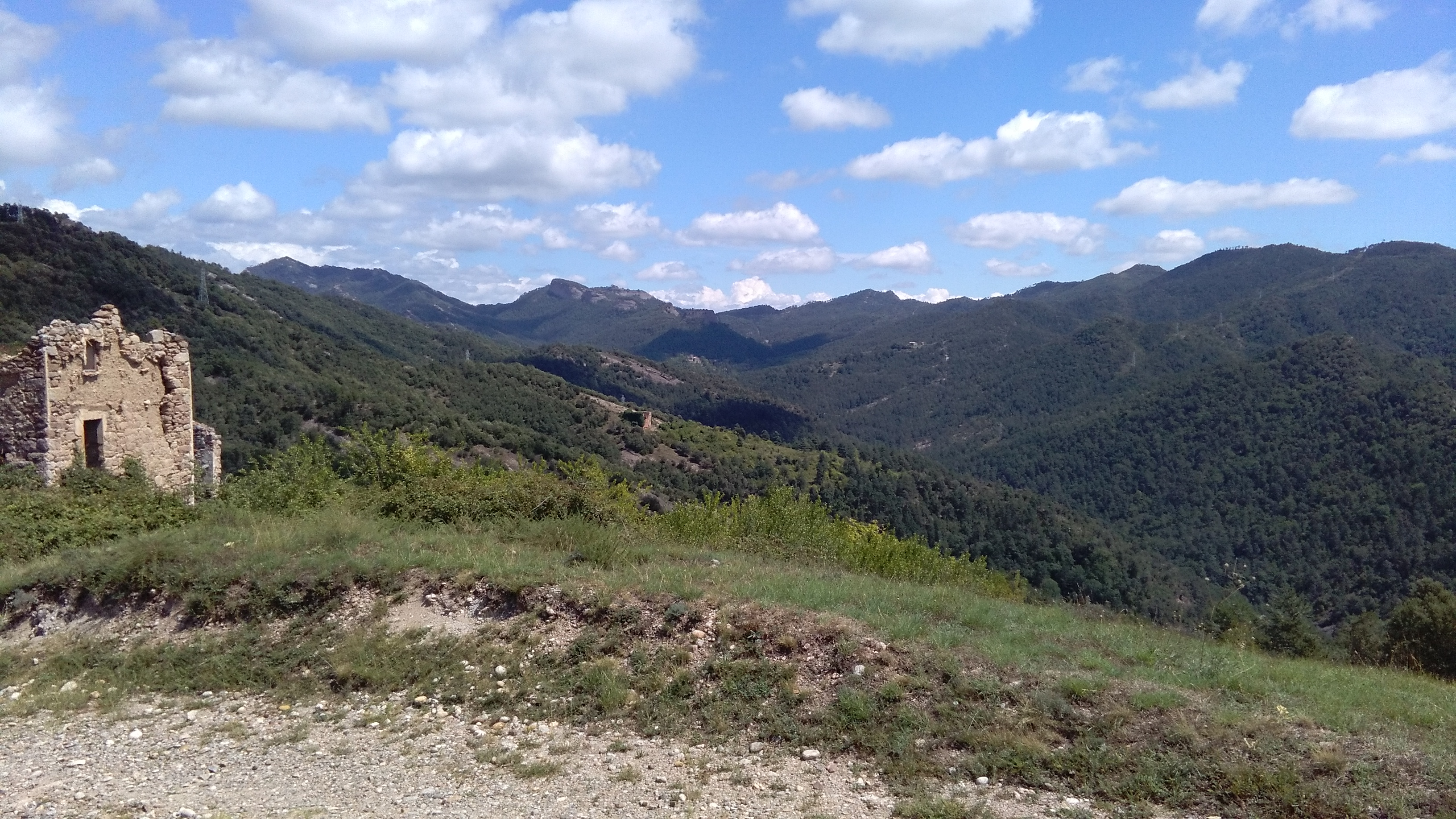 La Vall de la Portella (la Quar) des de la Collada del Mascaró